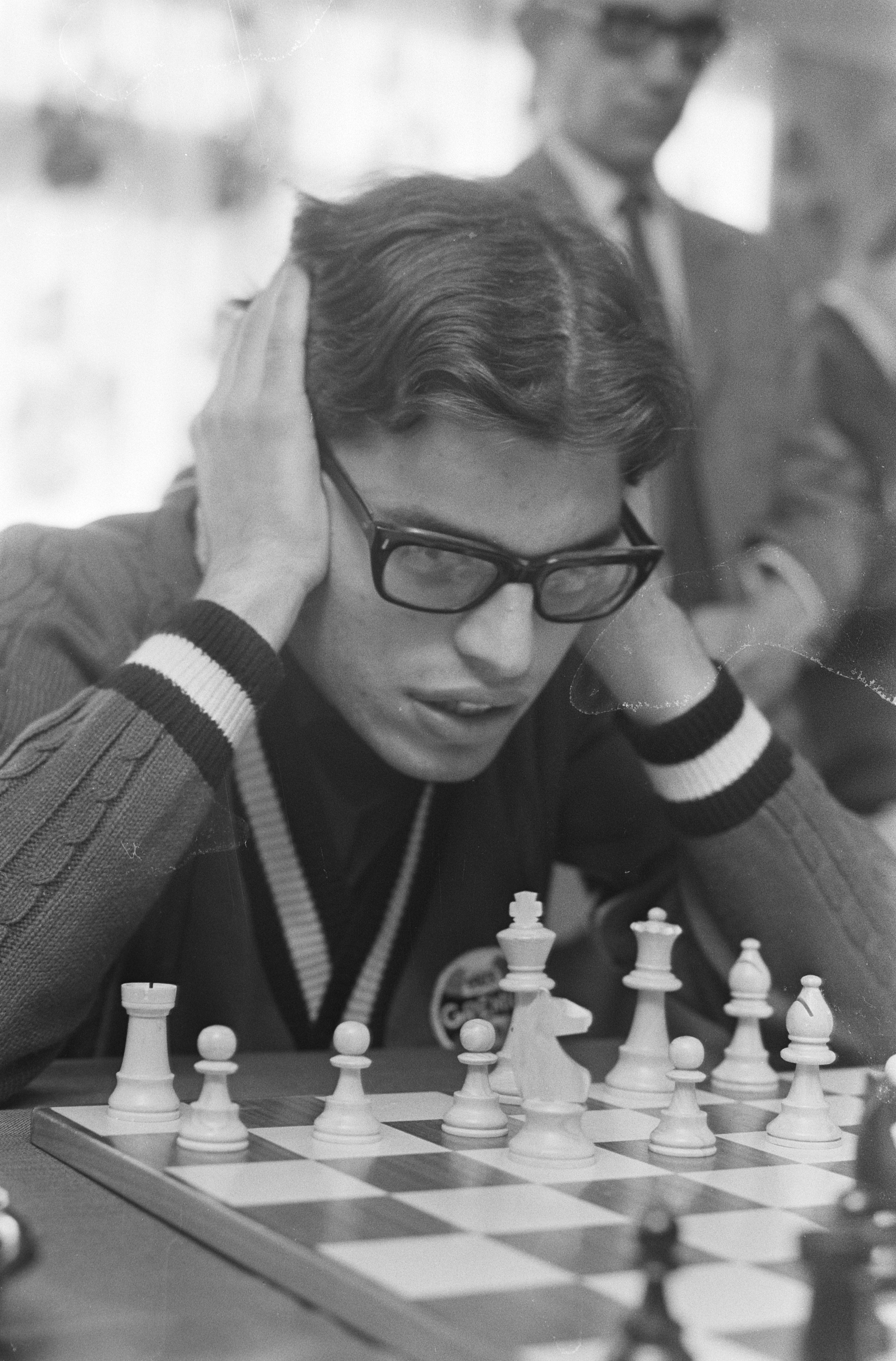 Collectie / Archief : Fotocollectie Anefo Reportage / Serie : [ onbekend ] Beschrijving : Hoogovenschaaktoernooi, Wijk aan Zee ; nr. 6: Kortsnoj, kop, in aktie, nr. 7, 8: Mecking, kop, in aktie, nr. 9: Petrosian, kop, in aktie Datum : 12 januari 1971 Locatie : Noord-Holland, Wijk aan Zee Trefwoorden : schaken Persoonsnaam : Kortsjnoi, Viktor Fotograaf : Verhoeff, Bert / Anefo Auteursrechthebbende : Nationaal Archief Materiaalsoort : Negatief (zwart/wit) Nummer archiefinventaris : bekijk toegang 2.24.01.05 Bestanddeelnummer : 924-1690